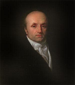 Swiss watchmaker Abraham Louis Breguet (1747-1823)